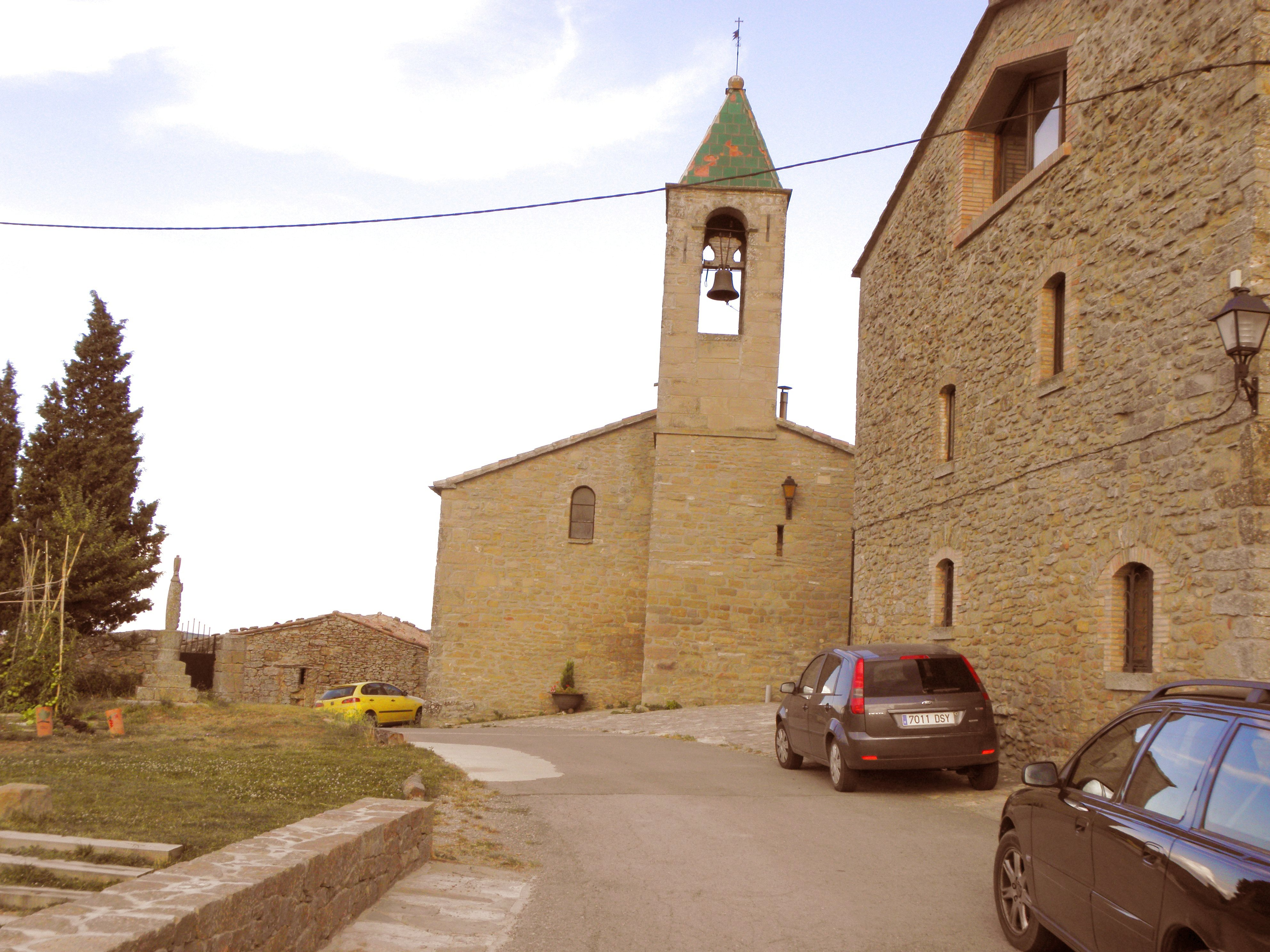 L'església de Sant Ponç a Prades de de la Molsosa (La Molsosa, Solsonès)Façana de ponent.